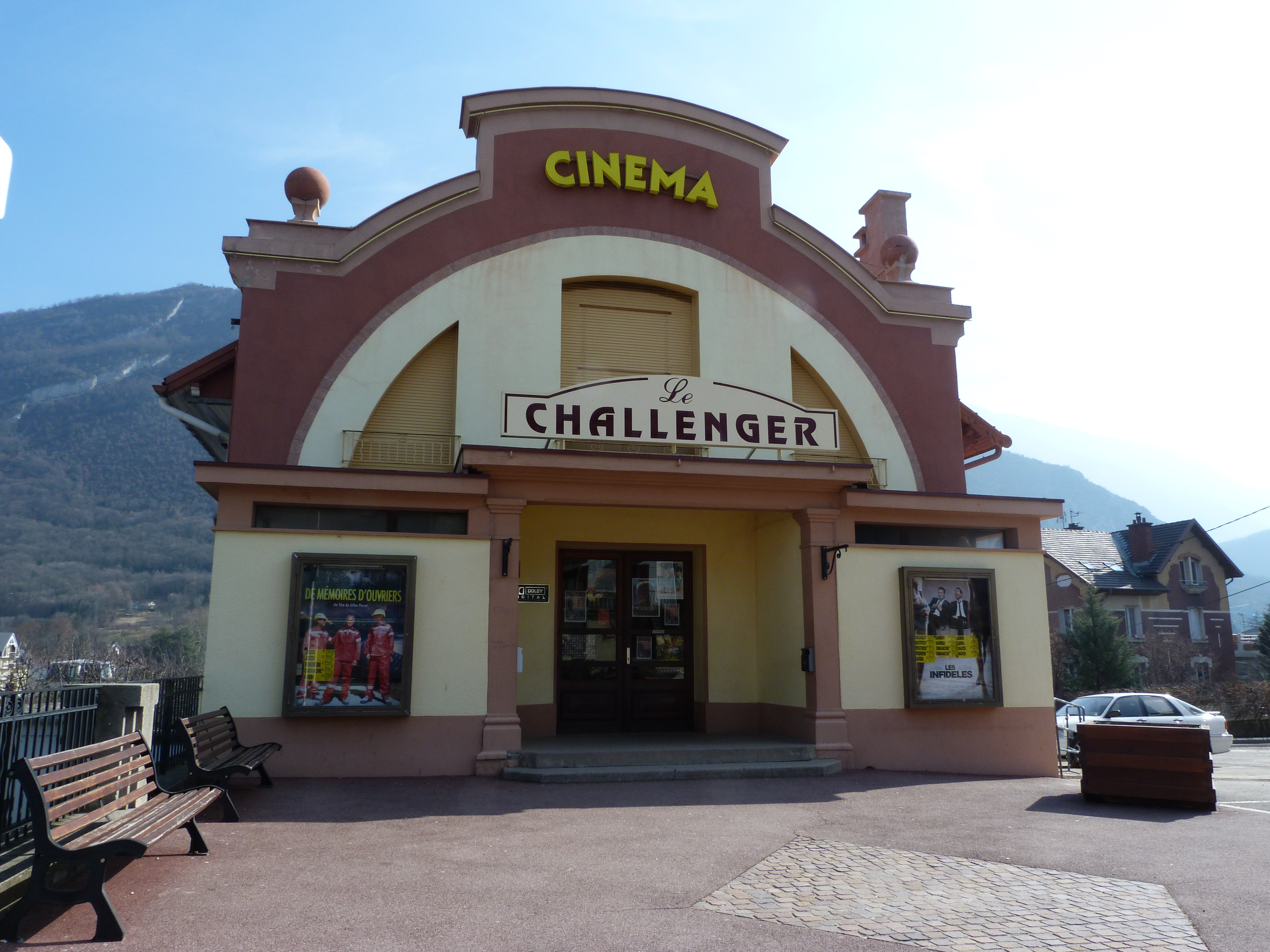 L'allée du casino au petit matin